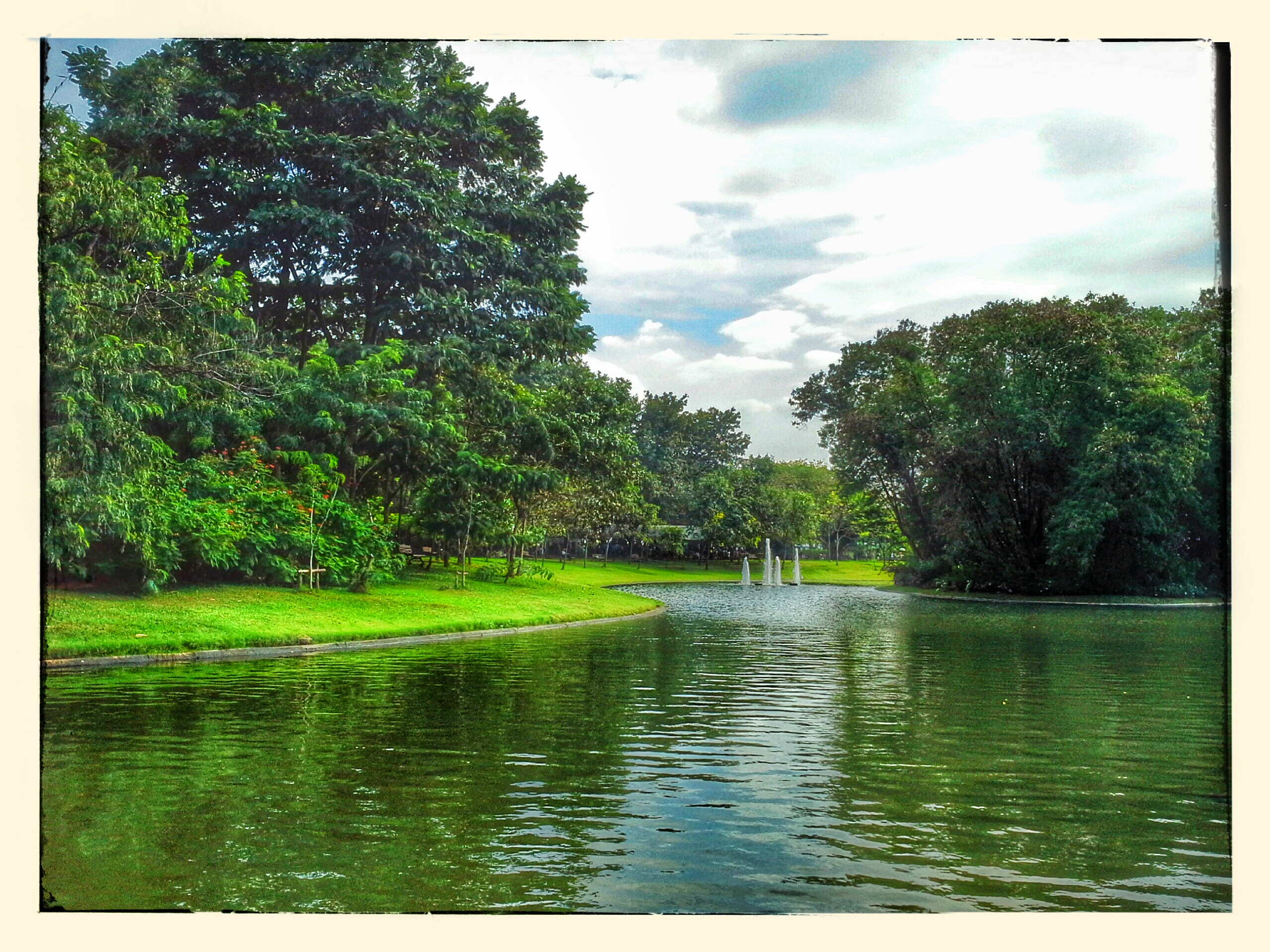 Queen Sirikij Park